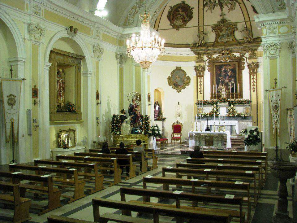 Interno della Chiesa di Allume.